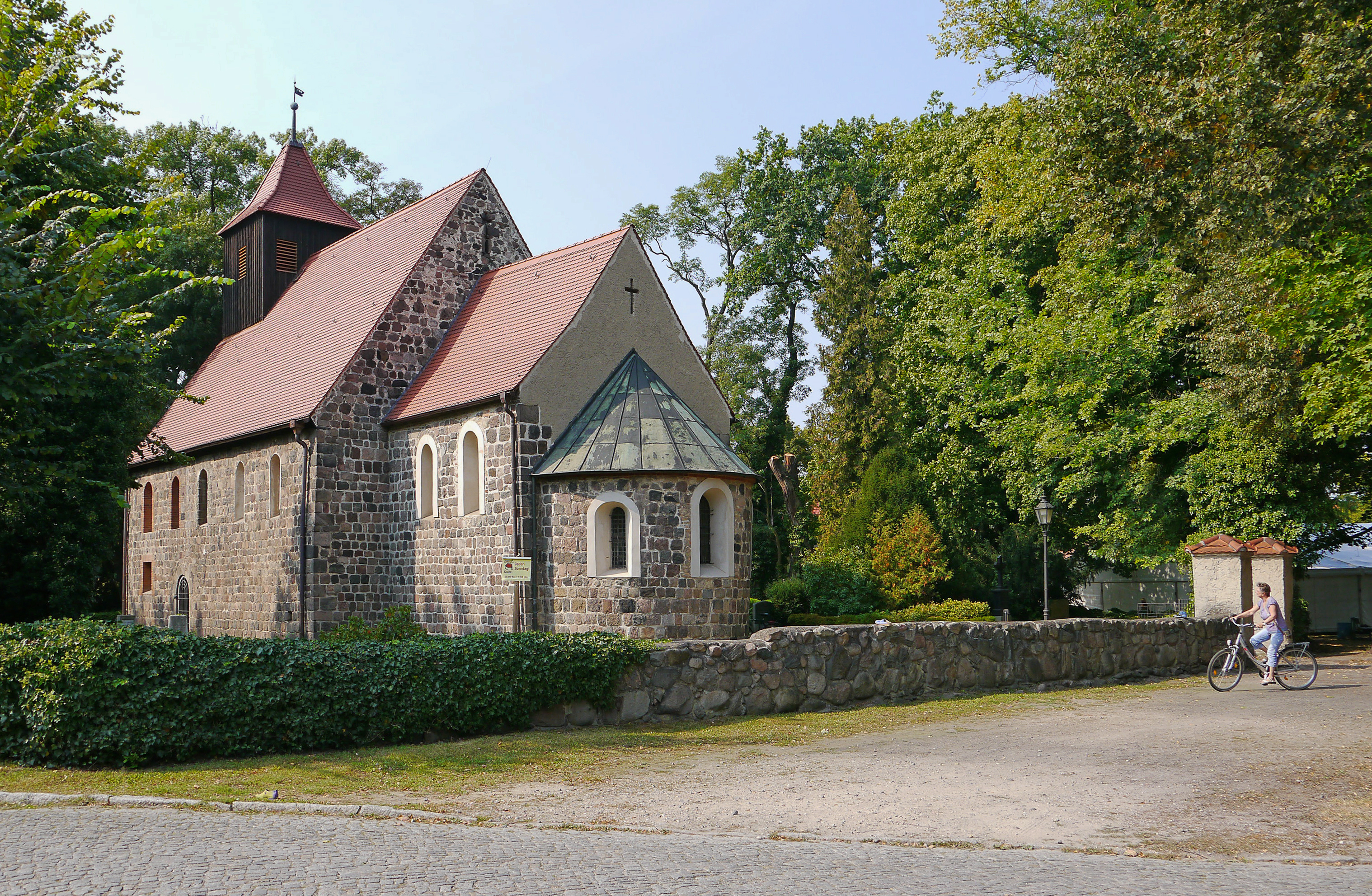 Baudenkmal: Stahnsdorf, Dorfkirche